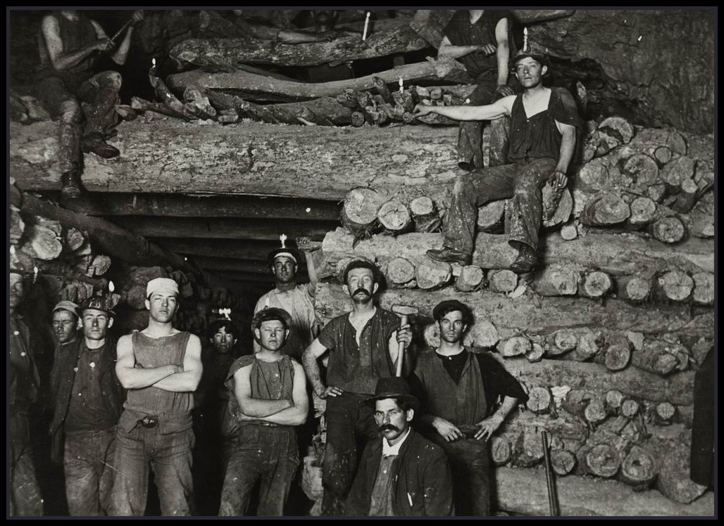 Wallaroo Miners underground. 1900